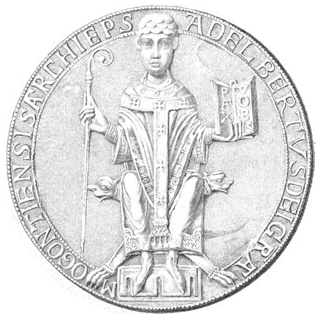 Zeichnung des Siegels von Erzbischof Adalbert I. von Mainz nach der (zwischen 1174 und 1211 gefälschten) Gründungsurkunde des Klosters Eberbach